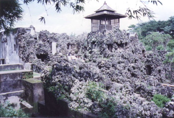 Sunyaragi meditation caves, Cirebon, Indonesia